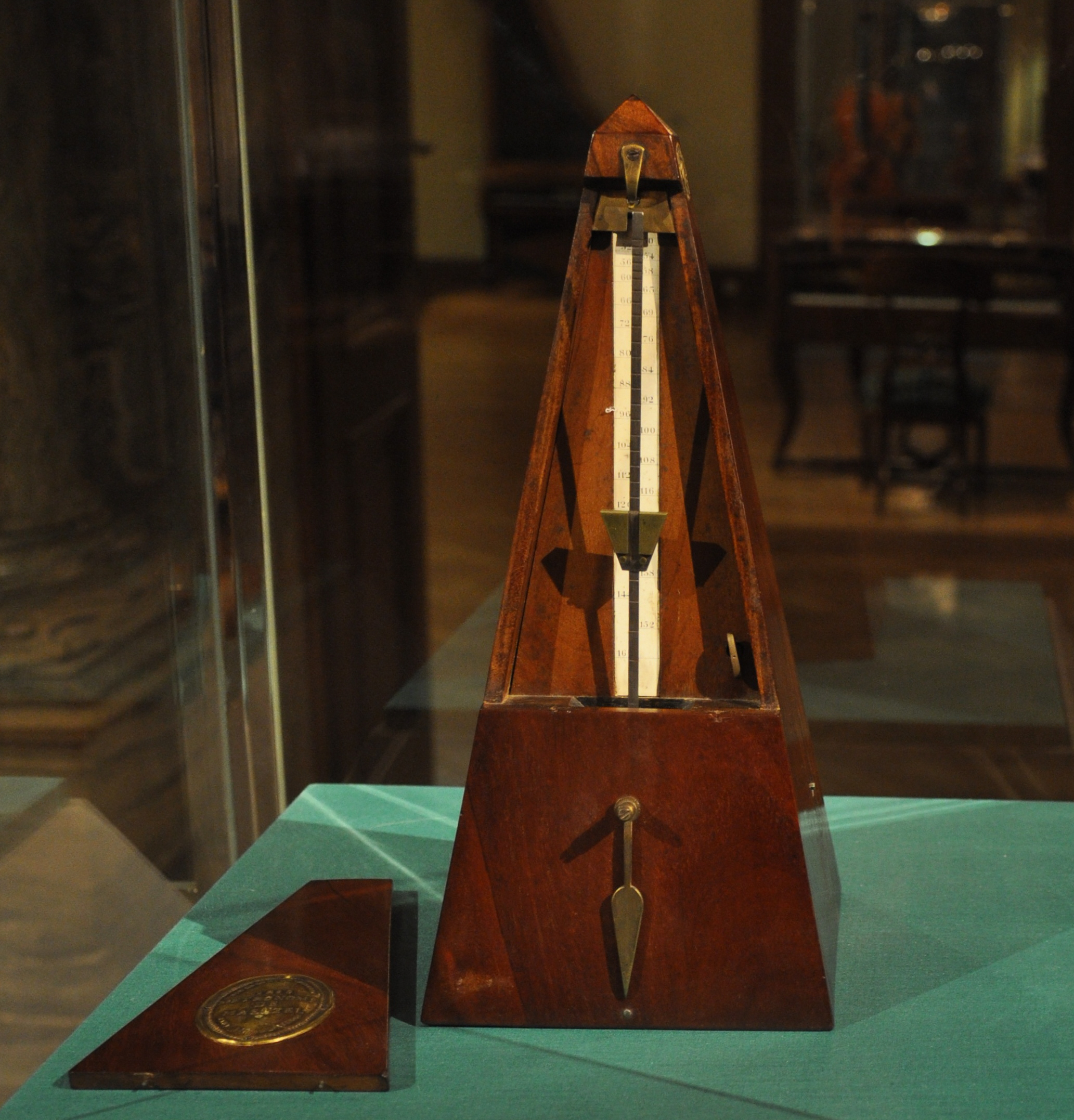 Metronom von Johann Nepomuk Mälzel, Paris 1815 Wien, Kunsthistorisches Museum, Sammlung alter Musikinstrumente (Neue Burg) Leihgabe der Gesellschaft der Musikfreunde Wien, I. N. 497